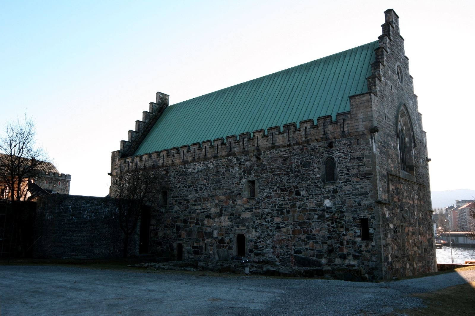 Håkonshallen i Bergen